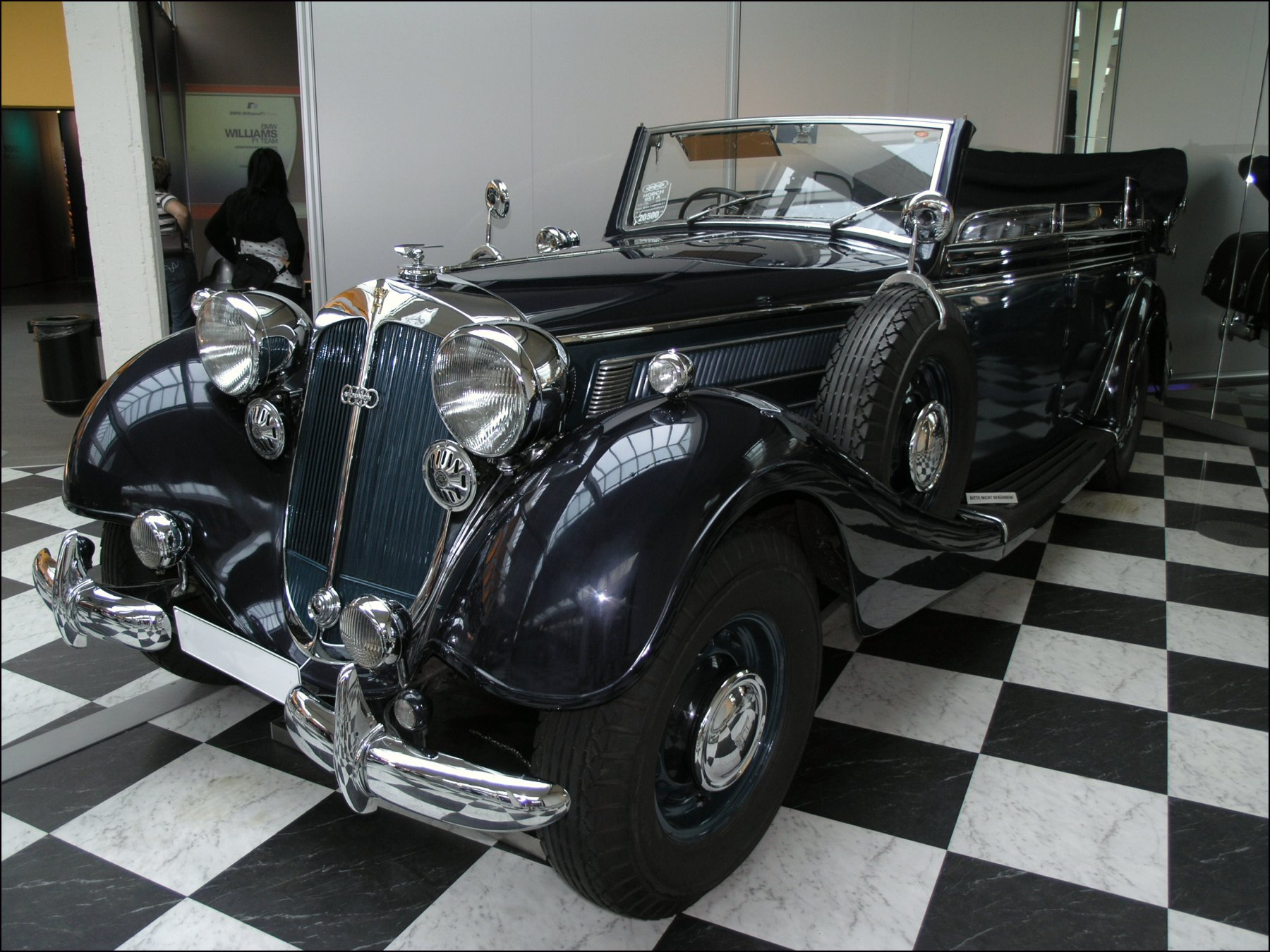 Horch 951 A (1937 / 1937-1940 369 vozů)